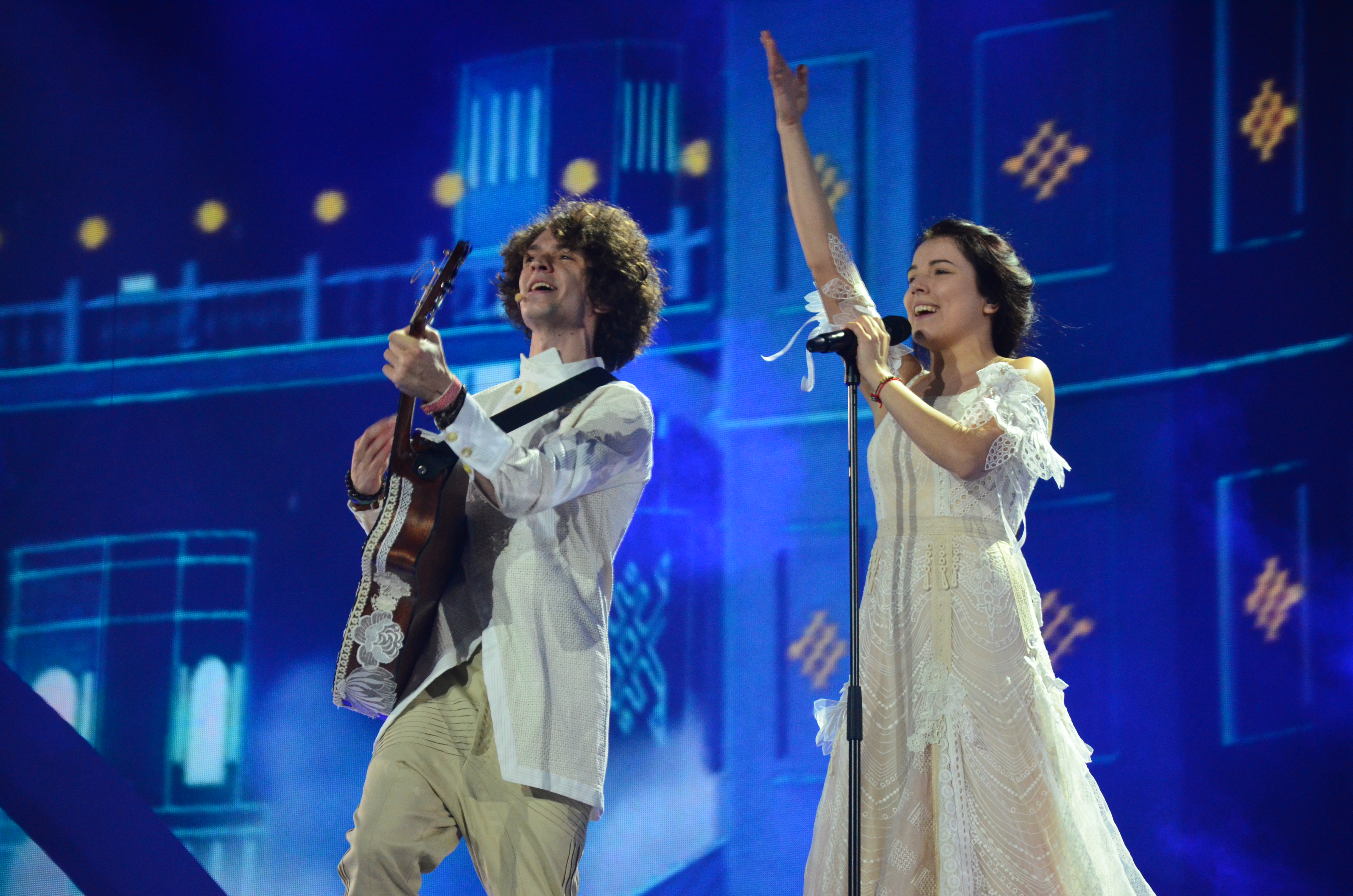 10 травня 2017 року у Києві відбулась генеральна репетиція 2 півфіналу "Євробачення".